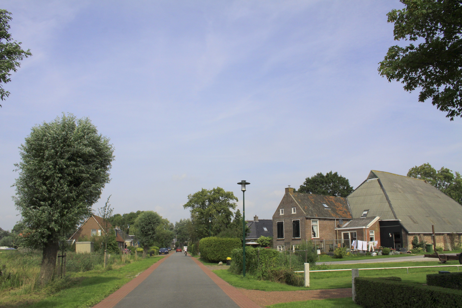 Dorpsgezicht Toppenhuzen in de gemeente Sûdwest Fryslân Friesland.